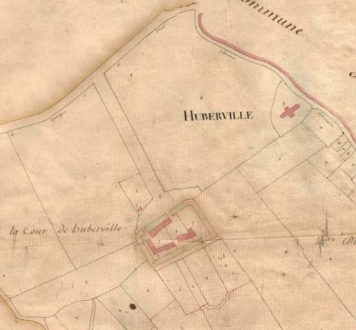 La Cour d’Huberville et l’église paroissiale sur un extrait du cadastre de 1812 – Numérisation P. Lemaignen.